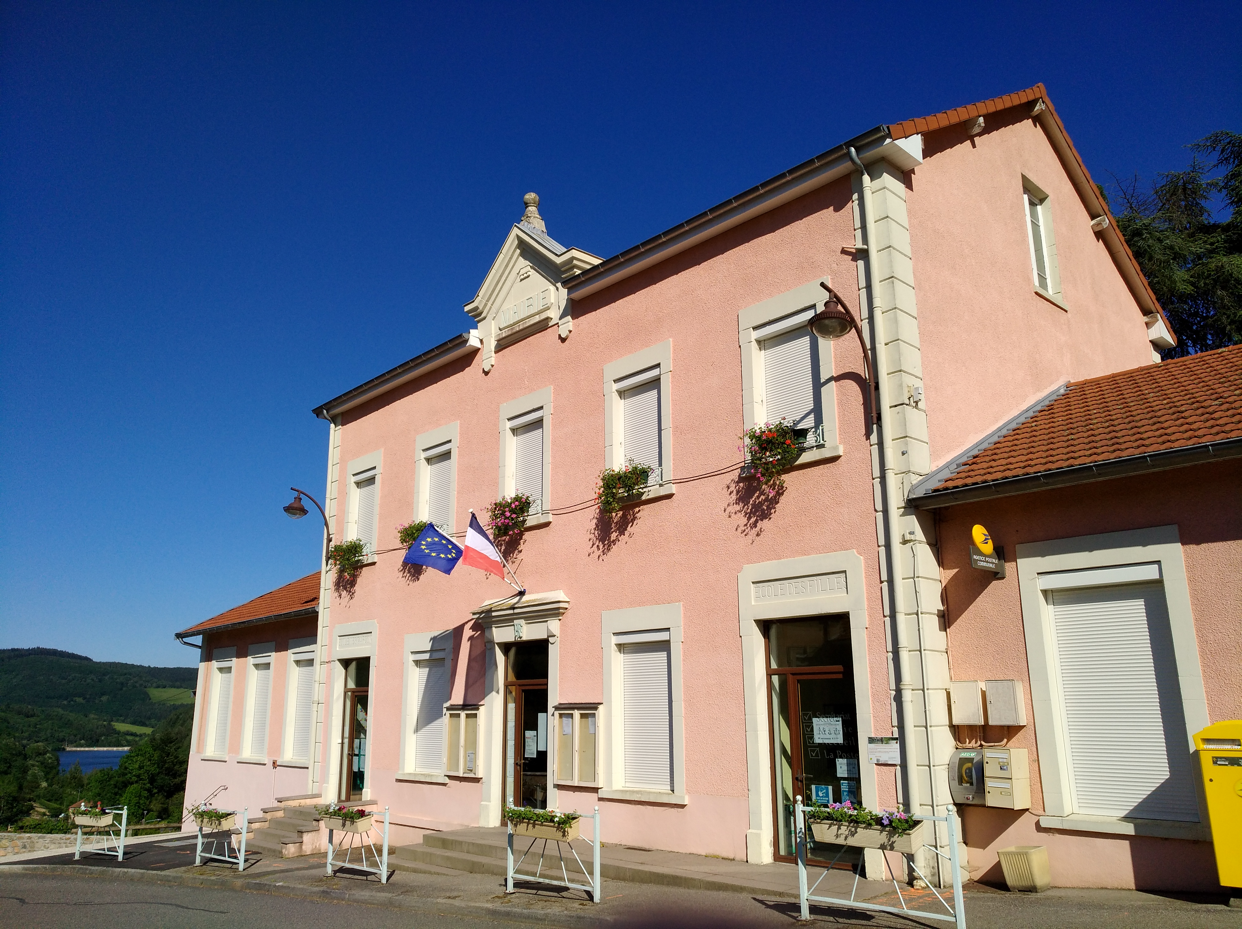 Mairie de Joux, dans le département du Rhône (France).